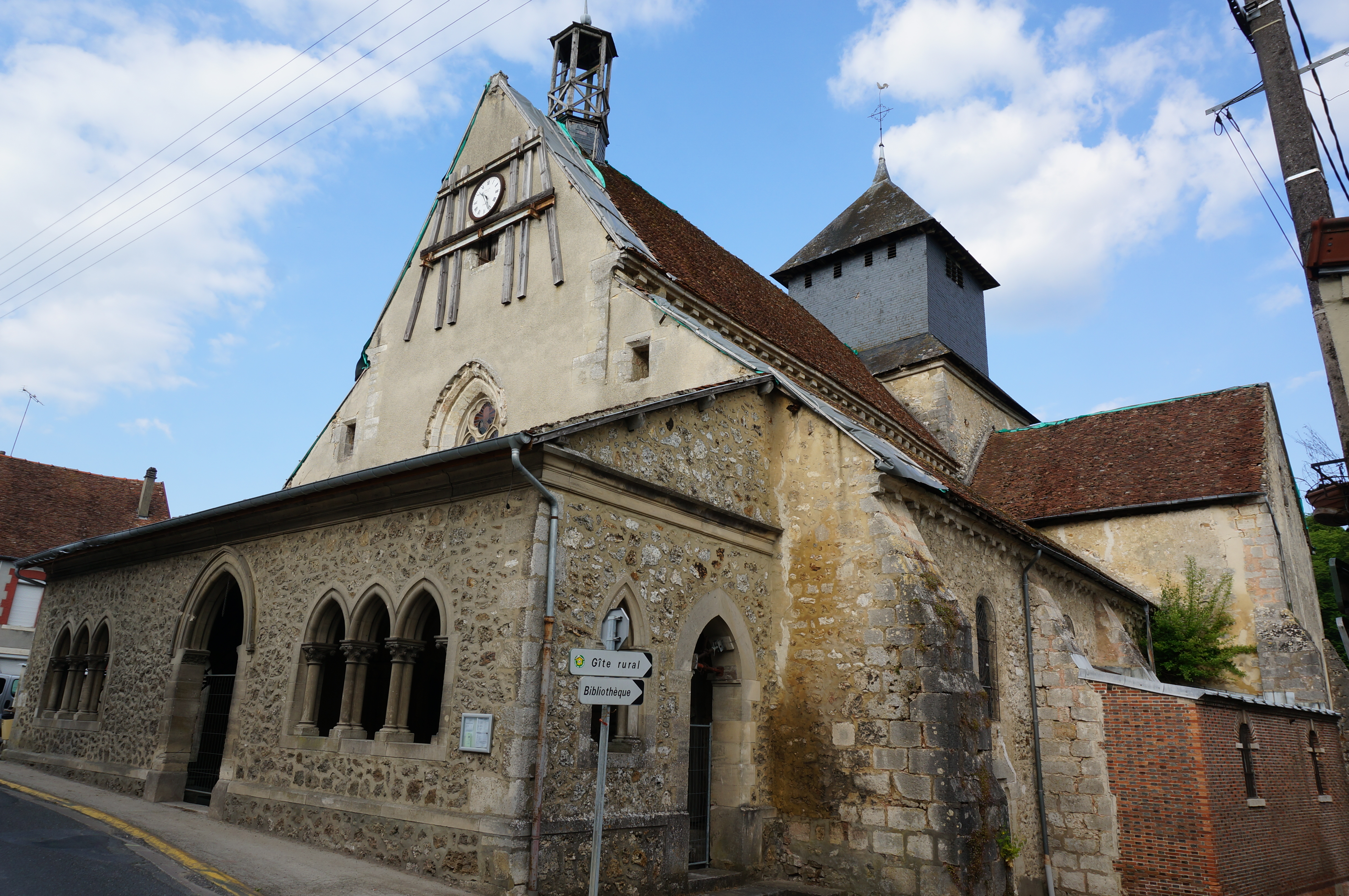 Église de Baye (Marne).